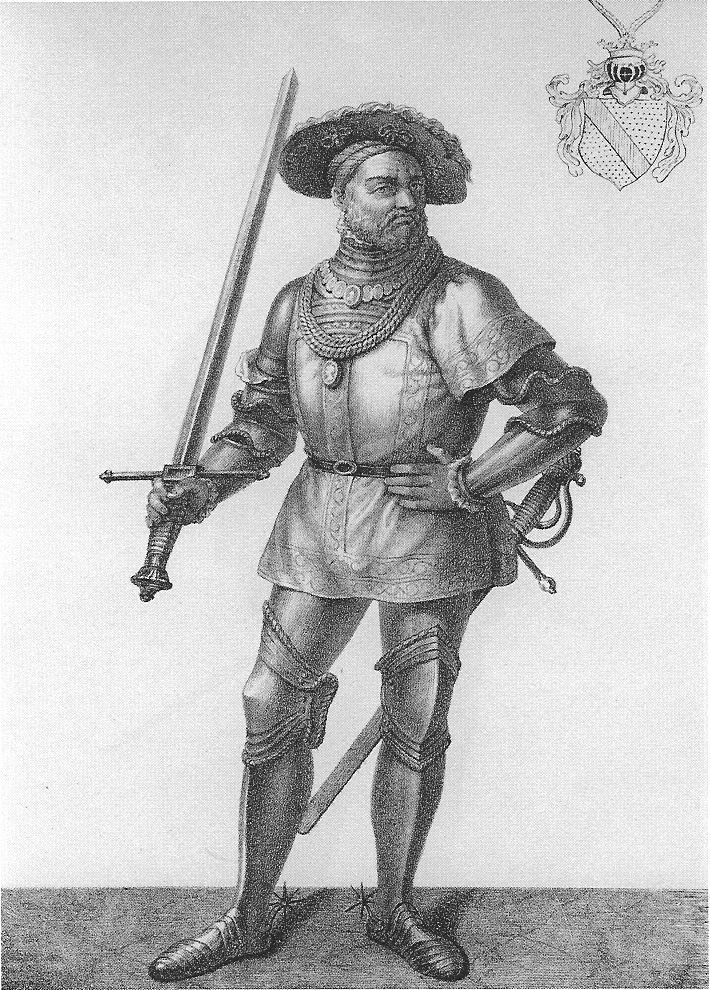 Gemeinfrei, da Zeichner mehr als 70 Jahre tot Motiv: Markgraf Ernst von Baden :Kategorie:Baden-Baden